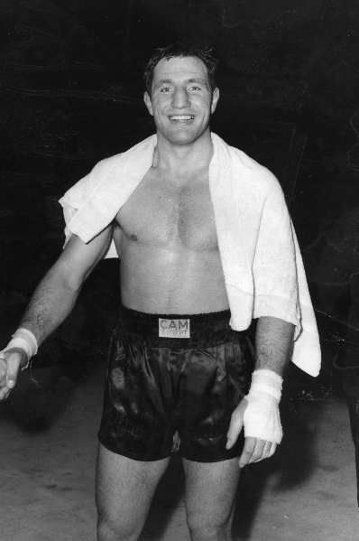 Francesco de Piccoli